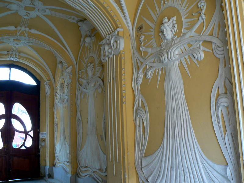 Szeged, Tábor utca 5. Épült:1904-1905